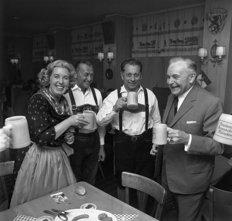 Maibockabend es Bundesratspräs. Ehard f. d. Presse in der Landesvertretung Bayern Bonn (rechts: Dr. Hans Ehard mit Trachtengruppe)